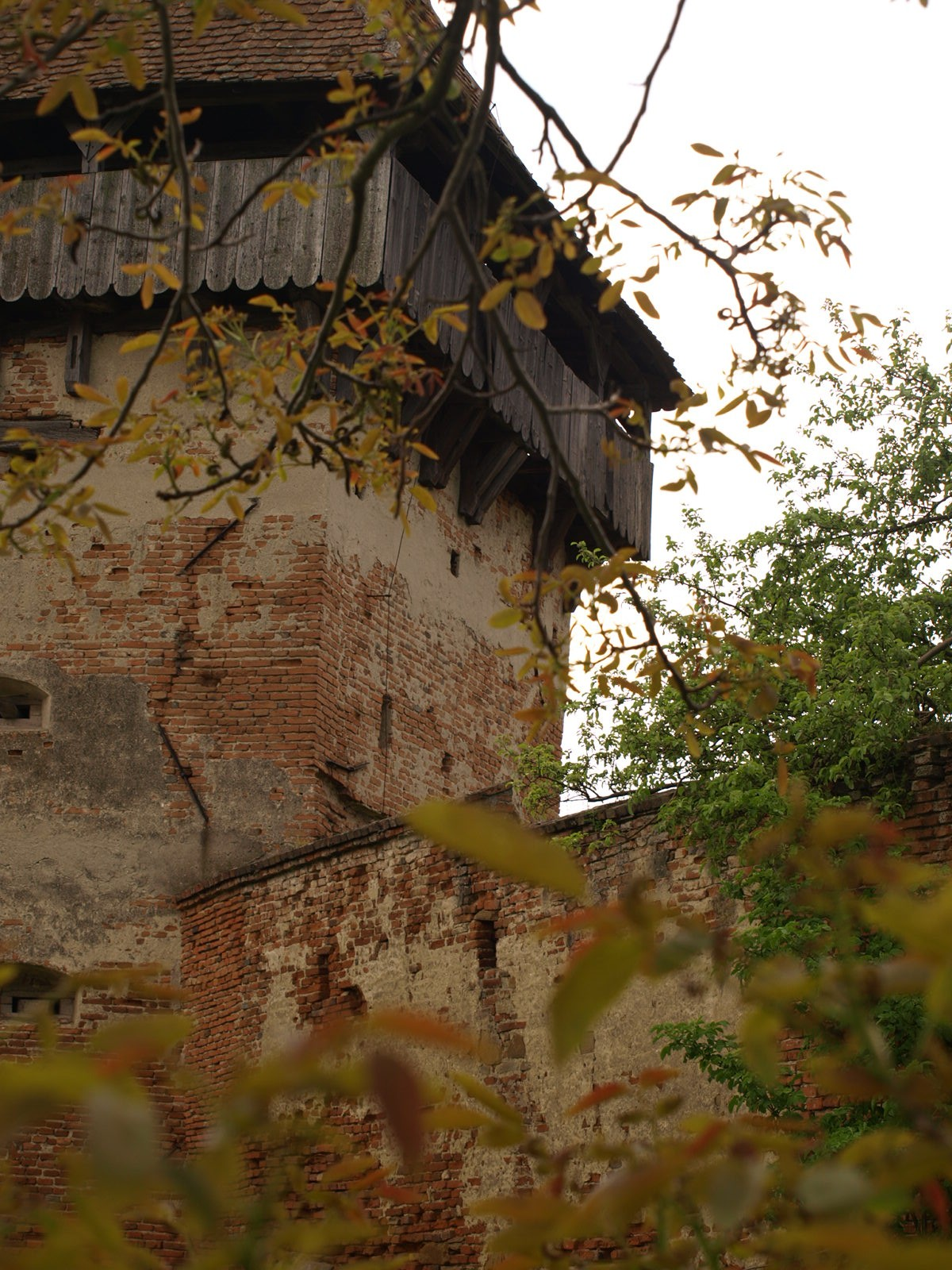 Turnul de aparare al Bisericii evanghelice fortificate din Alma Vii